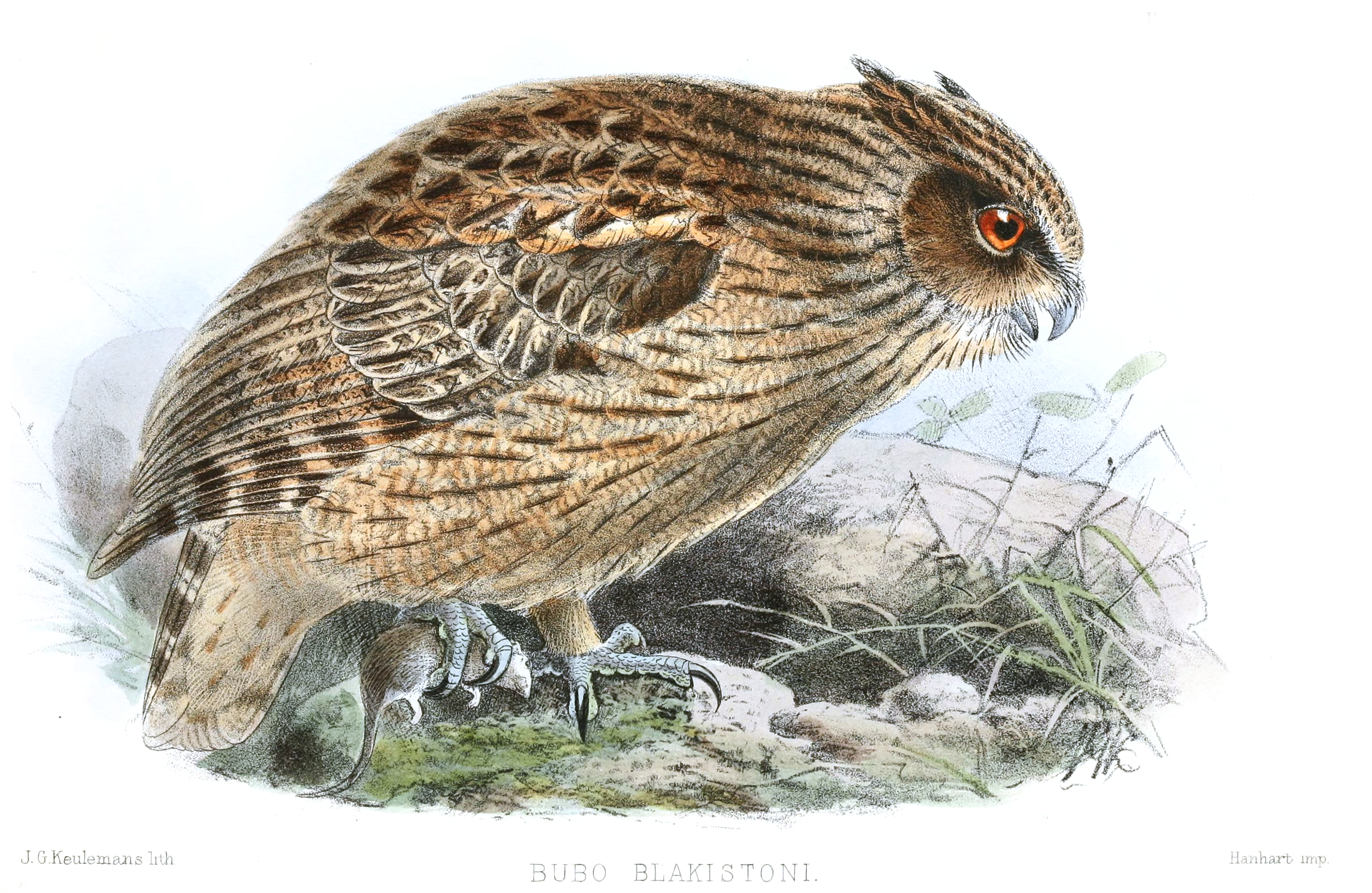 Bubo blakistoni